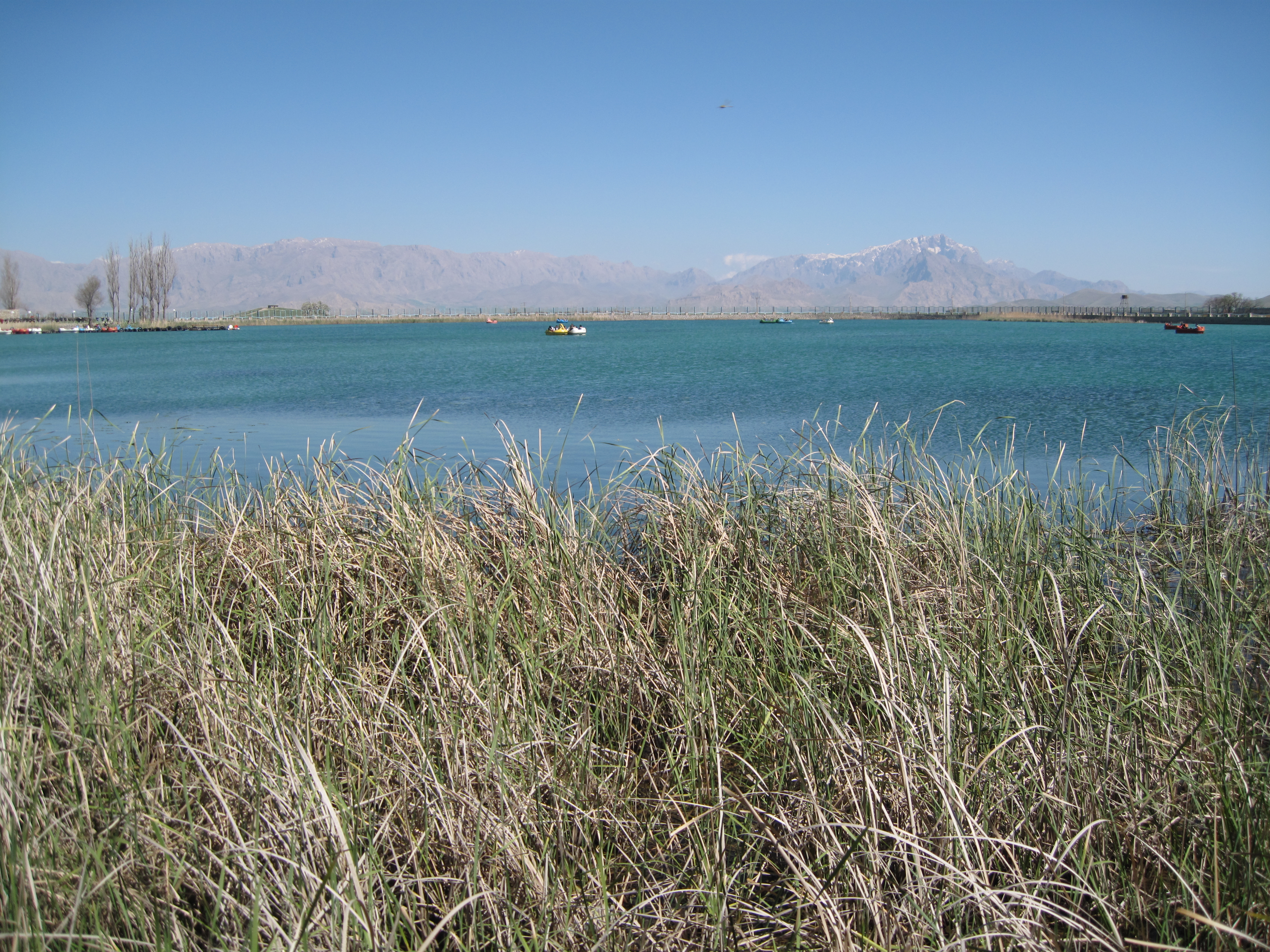 Sarab-e Niloufar